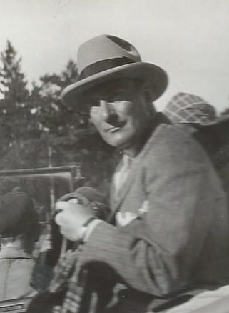 Lennart, Öster-Grogarn